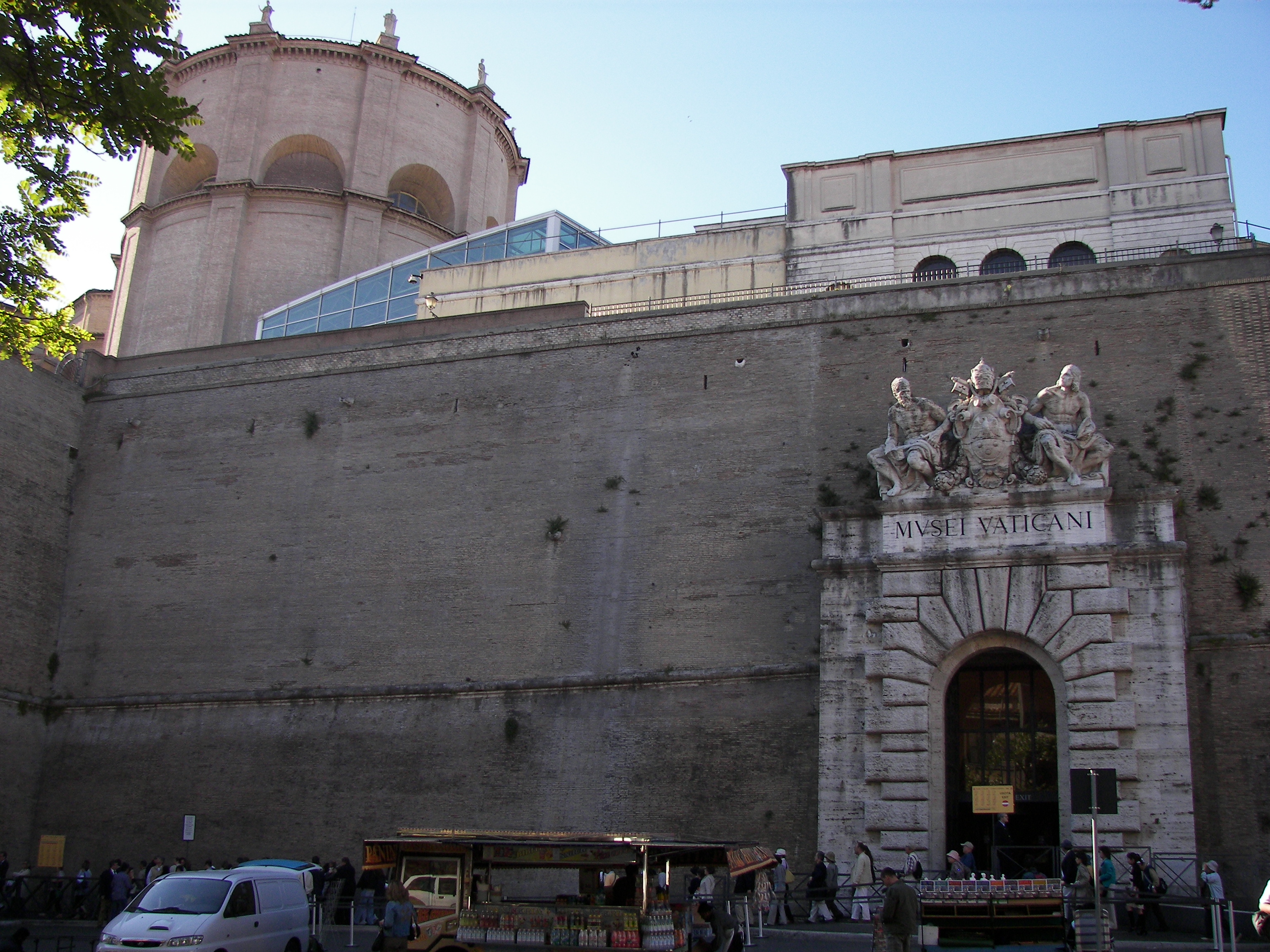 Vatican Museums entrance.